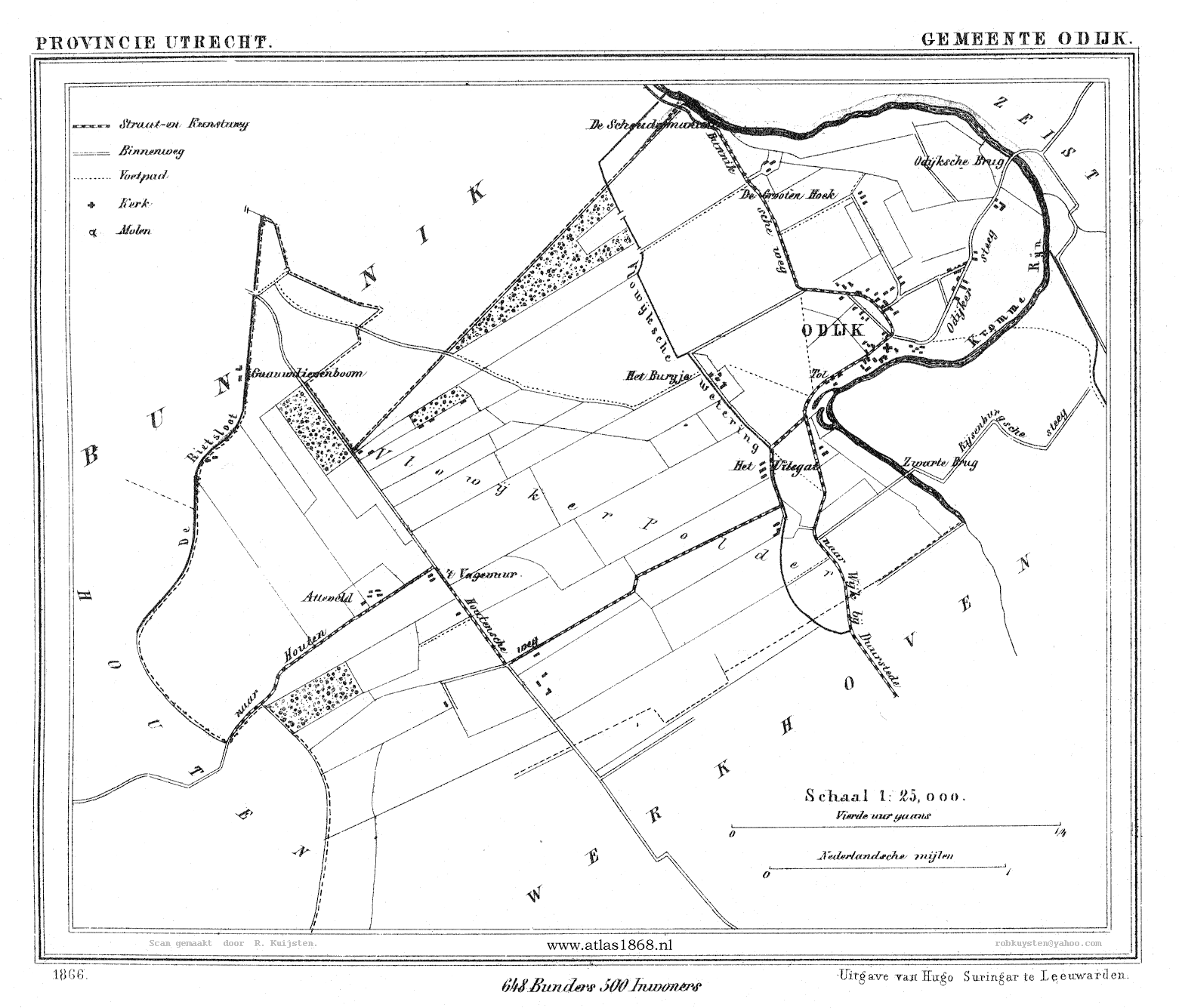 Kaart van Odijk uit Gemeente Atlas van Nederland, J. Kuyper 1865-1870, Uitgave Hugo Suringar Leeuwarden.